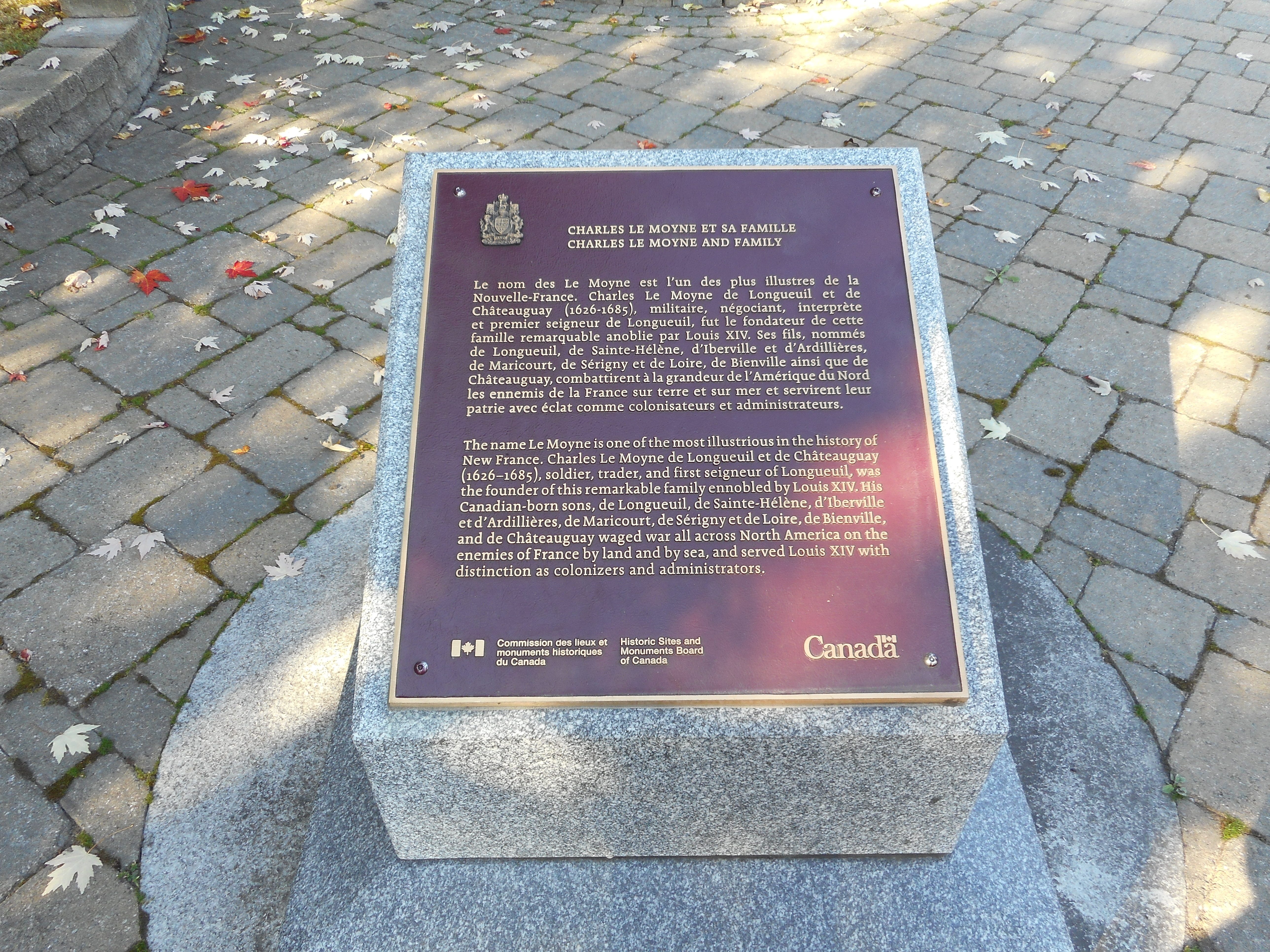 À côté du monument de Charles Le Moyne, une plaque de la Commission des lieux et monuments historiques du Canada commémorant l'importance historique nationale de Charles Le Moyne et de sa famille a été installée le 26 septembre 2002. L'initiative relève de la Société historique et culturelle du Marigot. Texte de la plaque : « Le nom des Le Moyne est l'un des plus illustres de la Nouvelle-France. Charles Le Moyne de Longueuil et de Châteauguay (1626-1685), militaire, négociant, interprète et premier seigneur de Longueuil, fut le fondateur de cette famille remarquable anoblie par Louis XIV. Ses fils, nommés de Longueuil, de Sainte-Hélène, d'Iberville et d'Ardillières, de Maricourt, de Sérigny et de Loire, de Bienville ainsi que de Châteauguay, combattirent à la grandeur de l'Amérique du Nord les ennemis de la France sur terre et sur mer st servirent leur patrie avec éclat comme colonisateurs et administrateurs. »